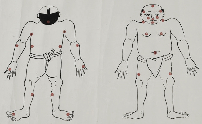 天下無双流の当身における急所図